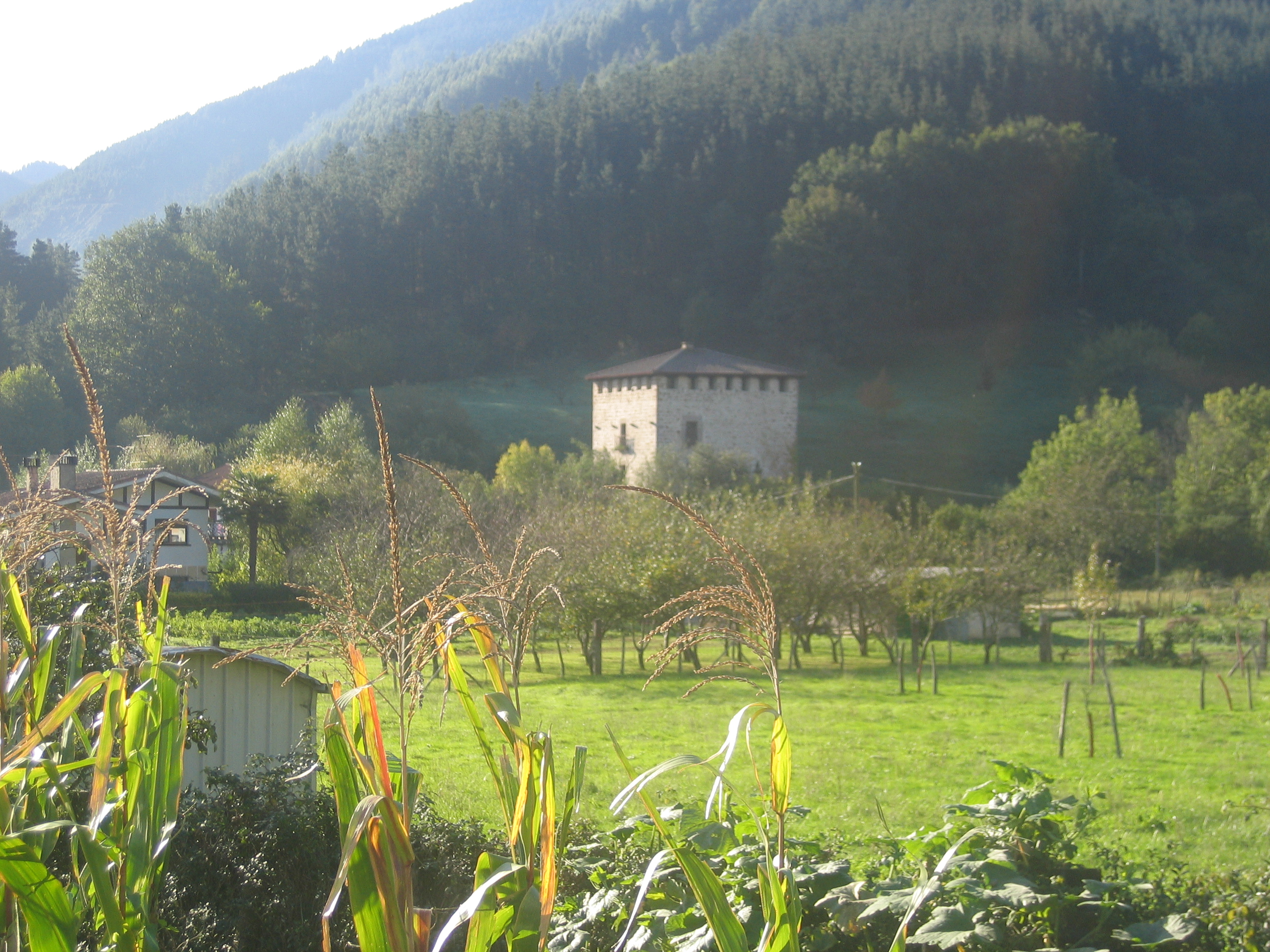 Torre medieval